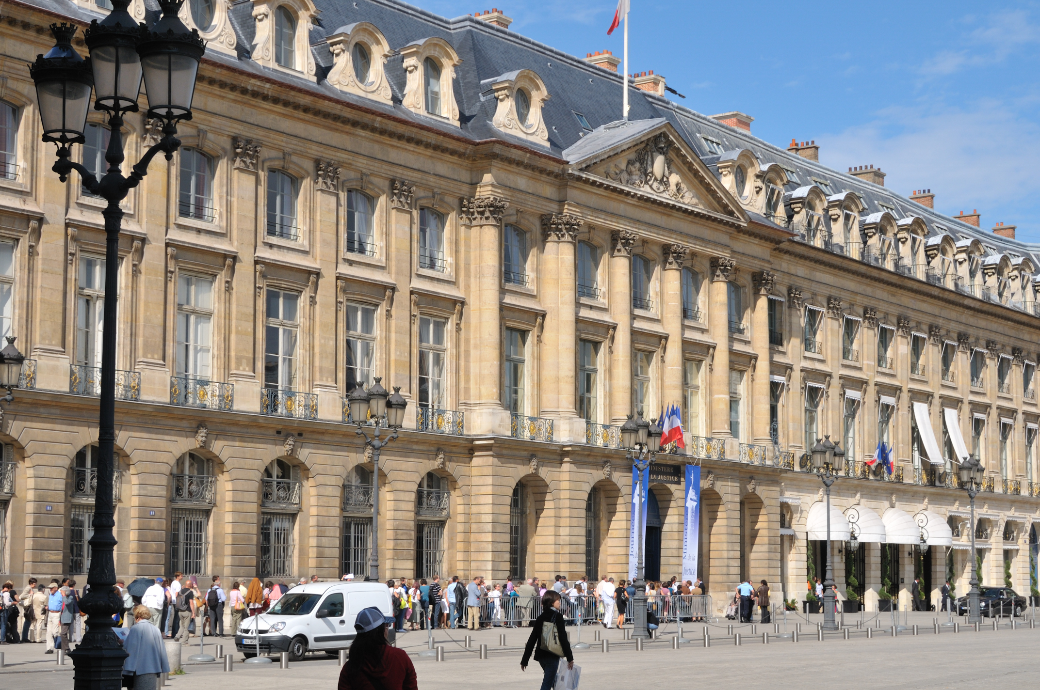 Hôtel de Bourvallais, siège du Ministère de la Justice, 11-13 place Vendôme, Paris, France Photo prise à l'occasion des journées européennes du patrimoine 2009